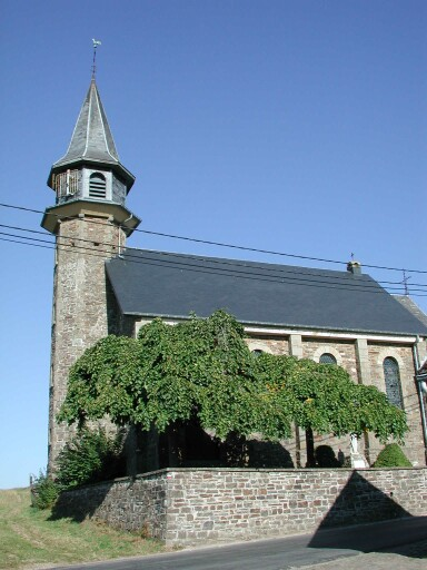 Église St. Hilaire de Maspelt, construit en 1930, remplacent une chapelle de 1736